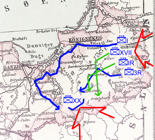 Den tyske forlægning fra Gumbinnen til Tannenberg 21.-26. august 1914. Forlægninger med jernbane markeret med blå farve. Forlægninger til fods markeret med grøn farve.]